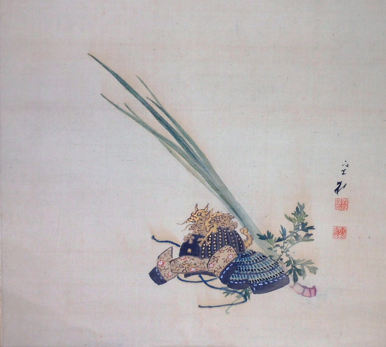 冑に菖蒲の図 里見雲嶺筆